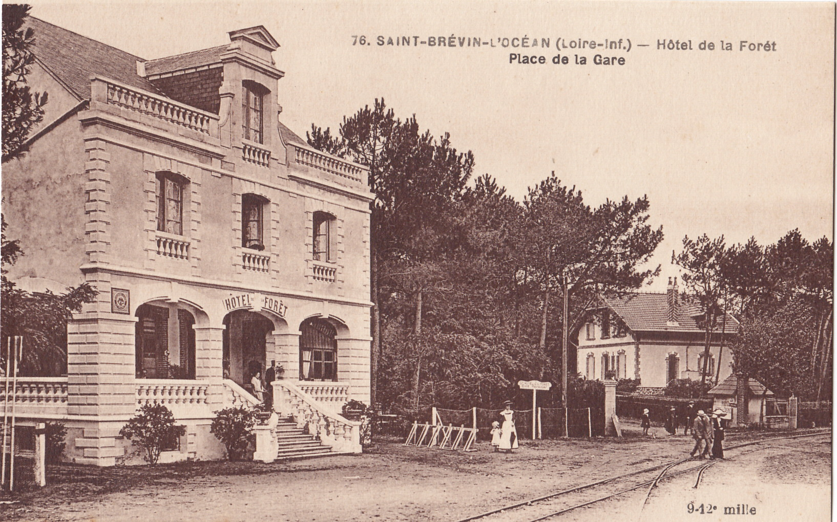 Carte postale ancienne éditée par Chapeau, n°76 :SAINT-BREVIN-L'OCEAN - Hotel de la Foret - Place de la Gare